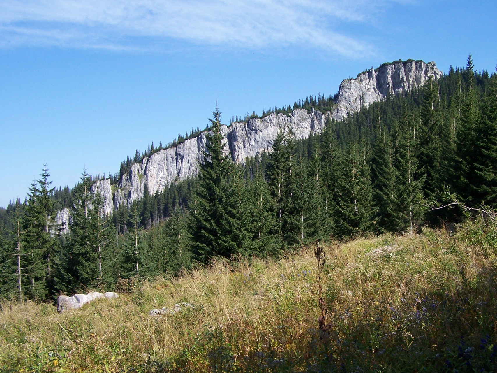 Niedźwiedź (Dolina Miętusia, West Tatra Mountains)